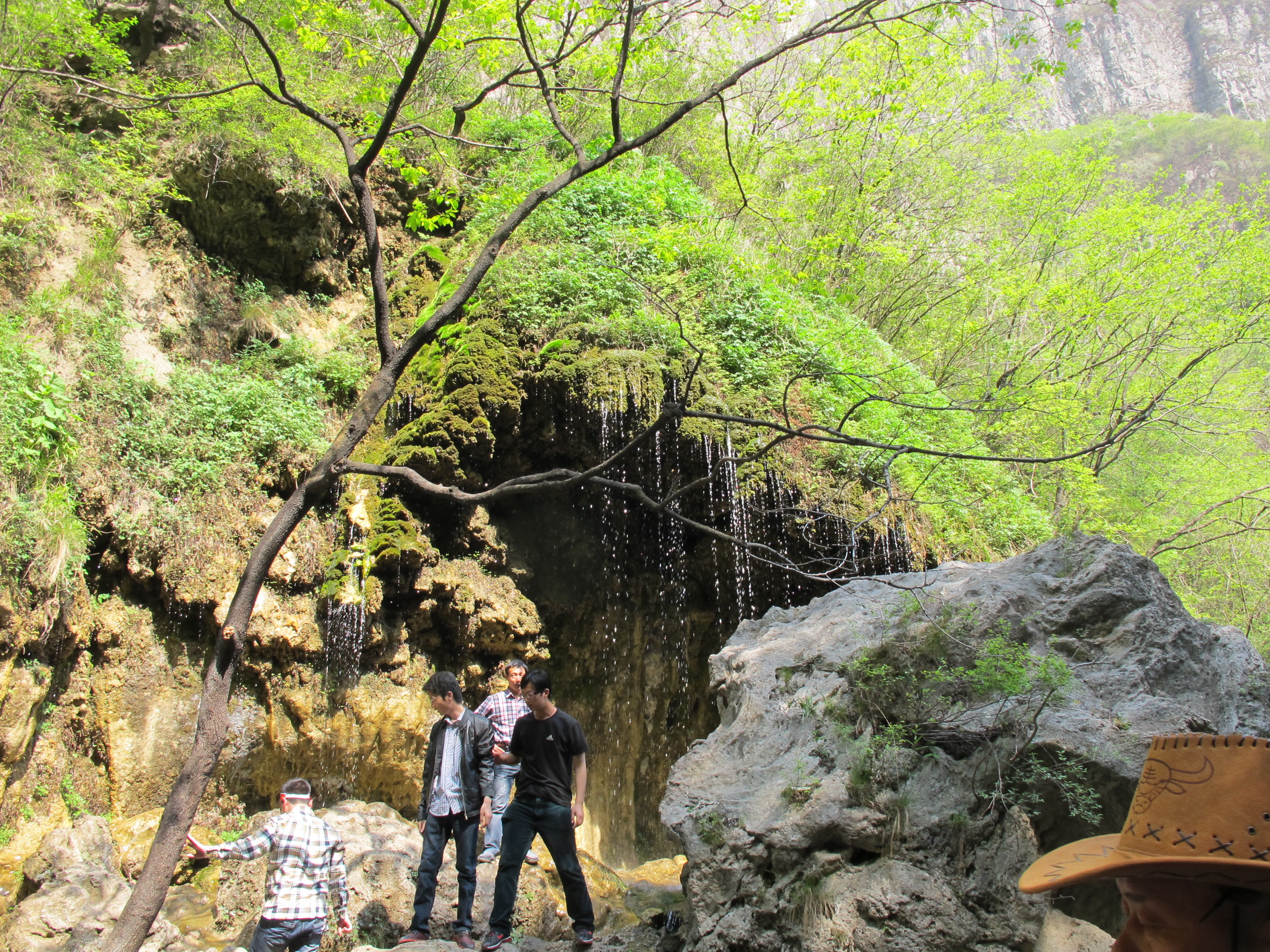 潭瀑峡水廉洞